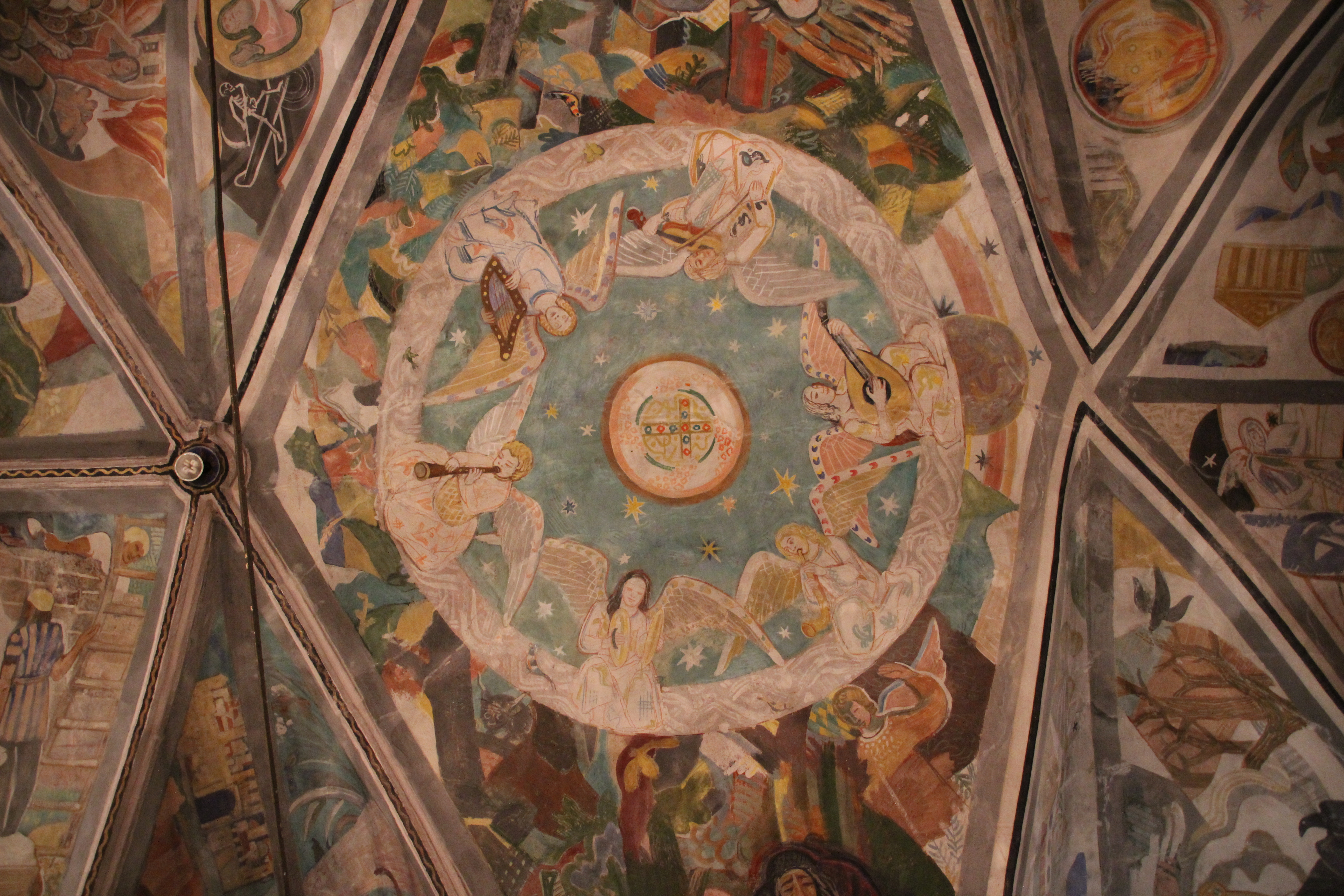 Deckengemälde von Peter Hecker in Klein St. Arnold über dem Hochgrab des hl. Arnoldus. Dargestellt ist ein Engelreigen.